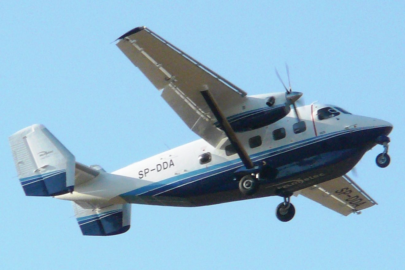 M-28 "Skytruck" podczas lotu. Piknik Lotniczy w Mielcu, 17 VIII 2013.